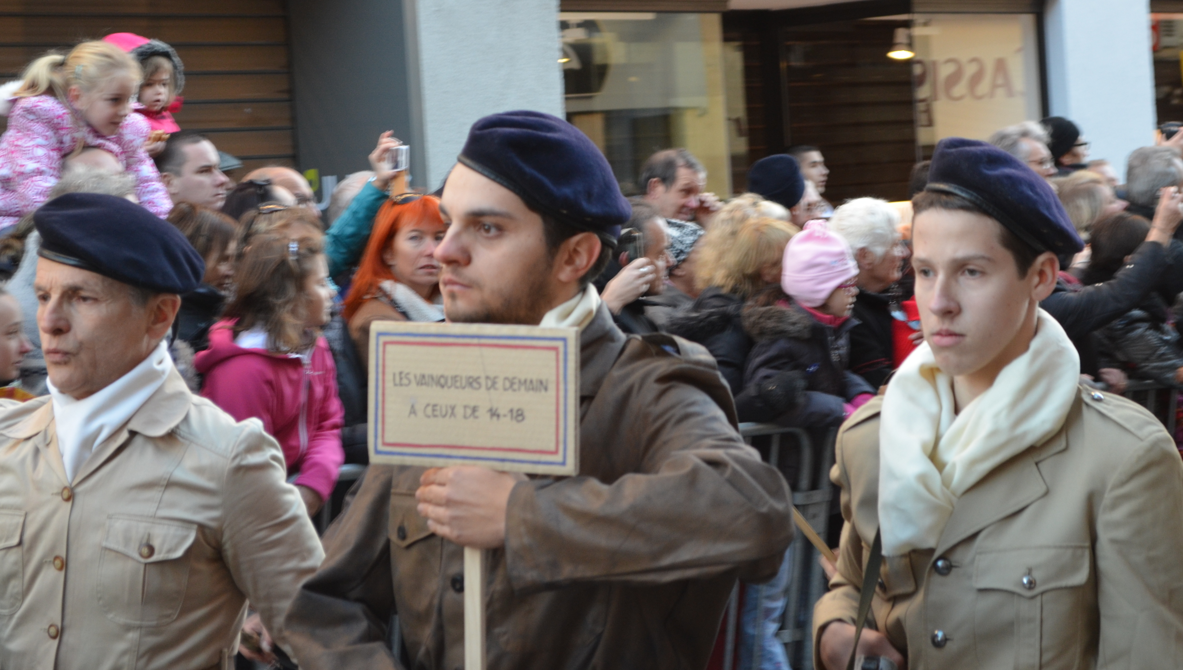 Cérémonie du 70e anniversaire du défilé du 11 novembre 1943 à Oyonnax, le 11 novembre 2013.